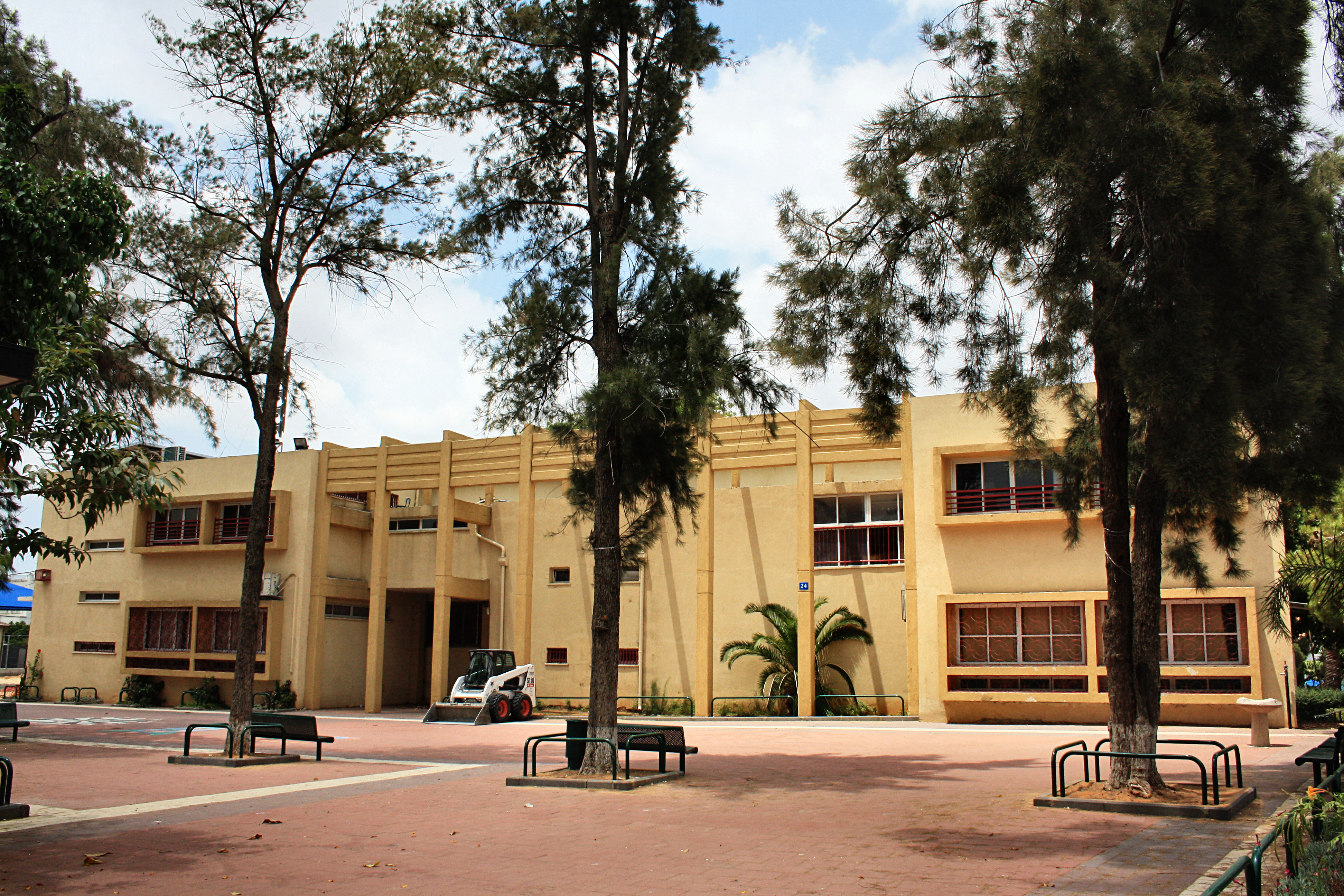 בית הספר "בארי", רחוב כצנלסון, ראשון לציון.